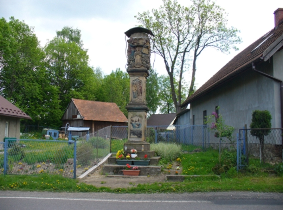 Fragment wsi Gołuchowice z przydrożnym świątkiem